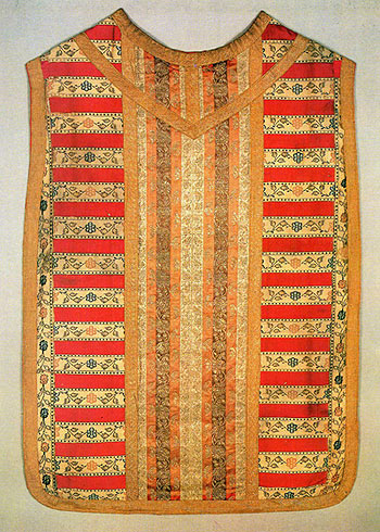 Арнат з Троіцкага касцёла ў Чарнаўчыцах